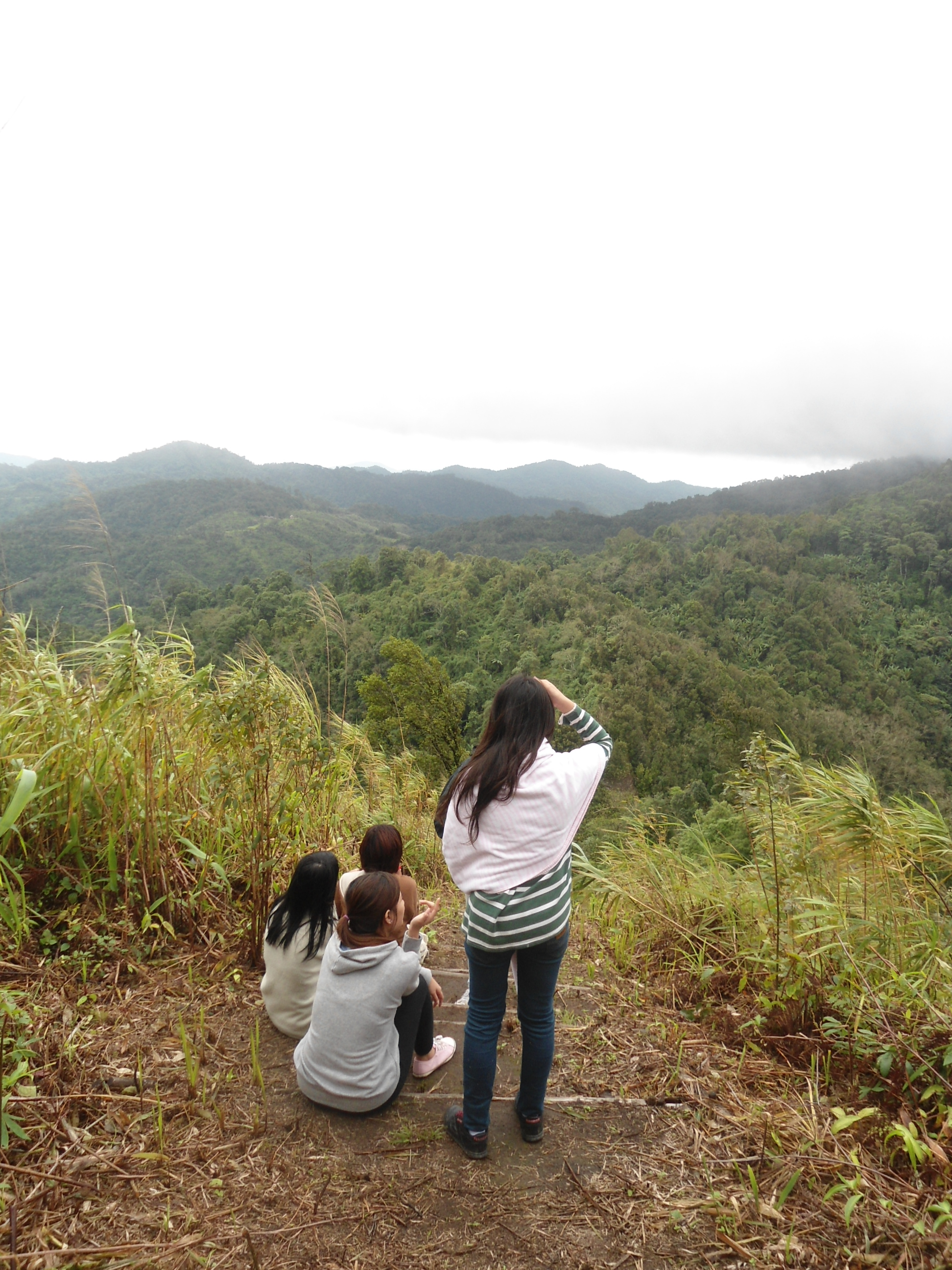 จุดชมวิวภูสวรรค์ สูงจากระดับน้ำทะเลปานกลาง 1429 เมตร บริเวณใกล้กับช่องเย็น ในอุทยานแห่งชาติแม่วงก์ อำเภอปางศิลาทอง จังหวัดกำแพงเพชร